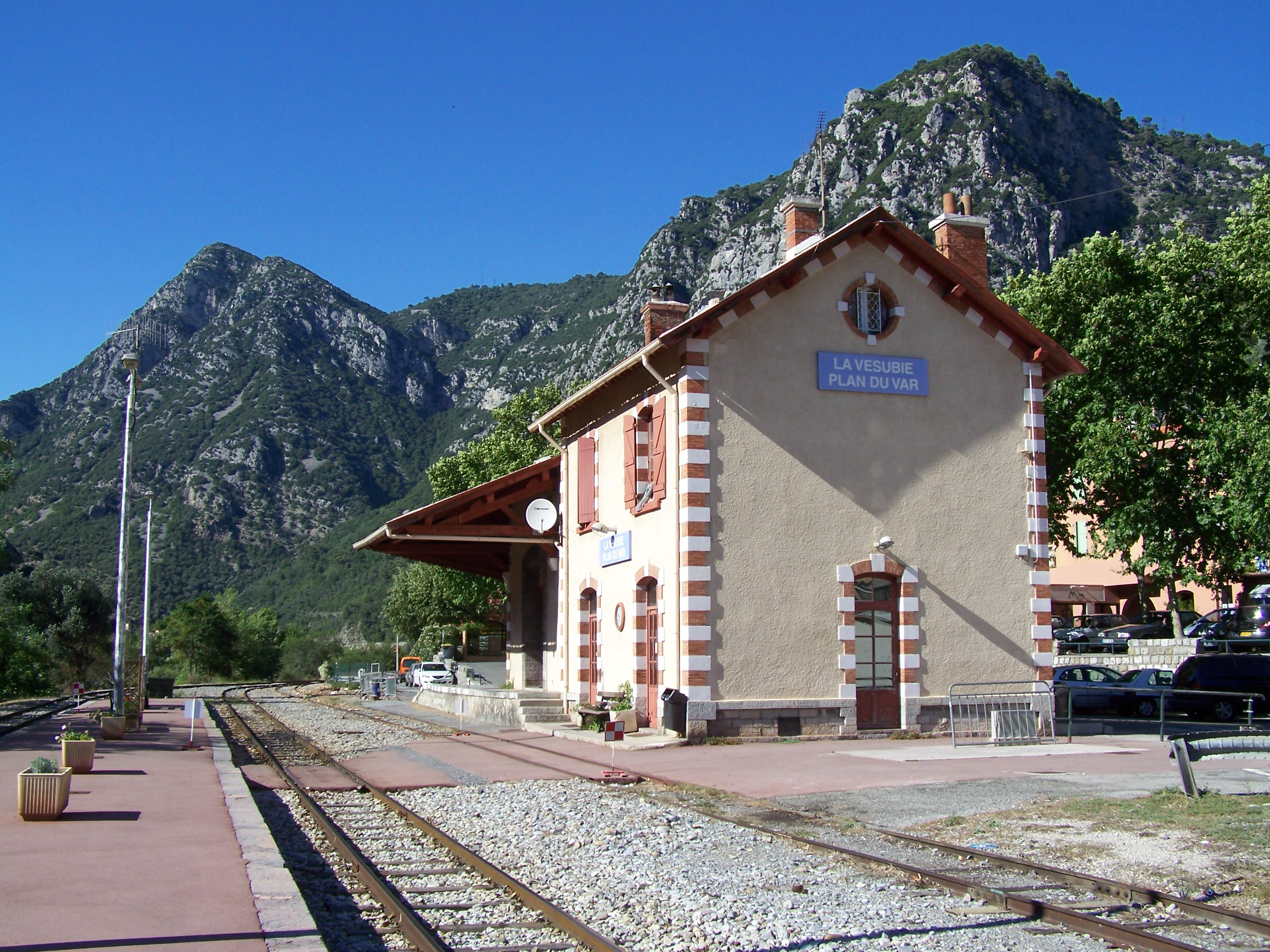 Gare de Plan du Var (Alpes-Maritimes, France) sur la ligne des Chemins de fer de Provence ("train des pignes" Nice-Digne).